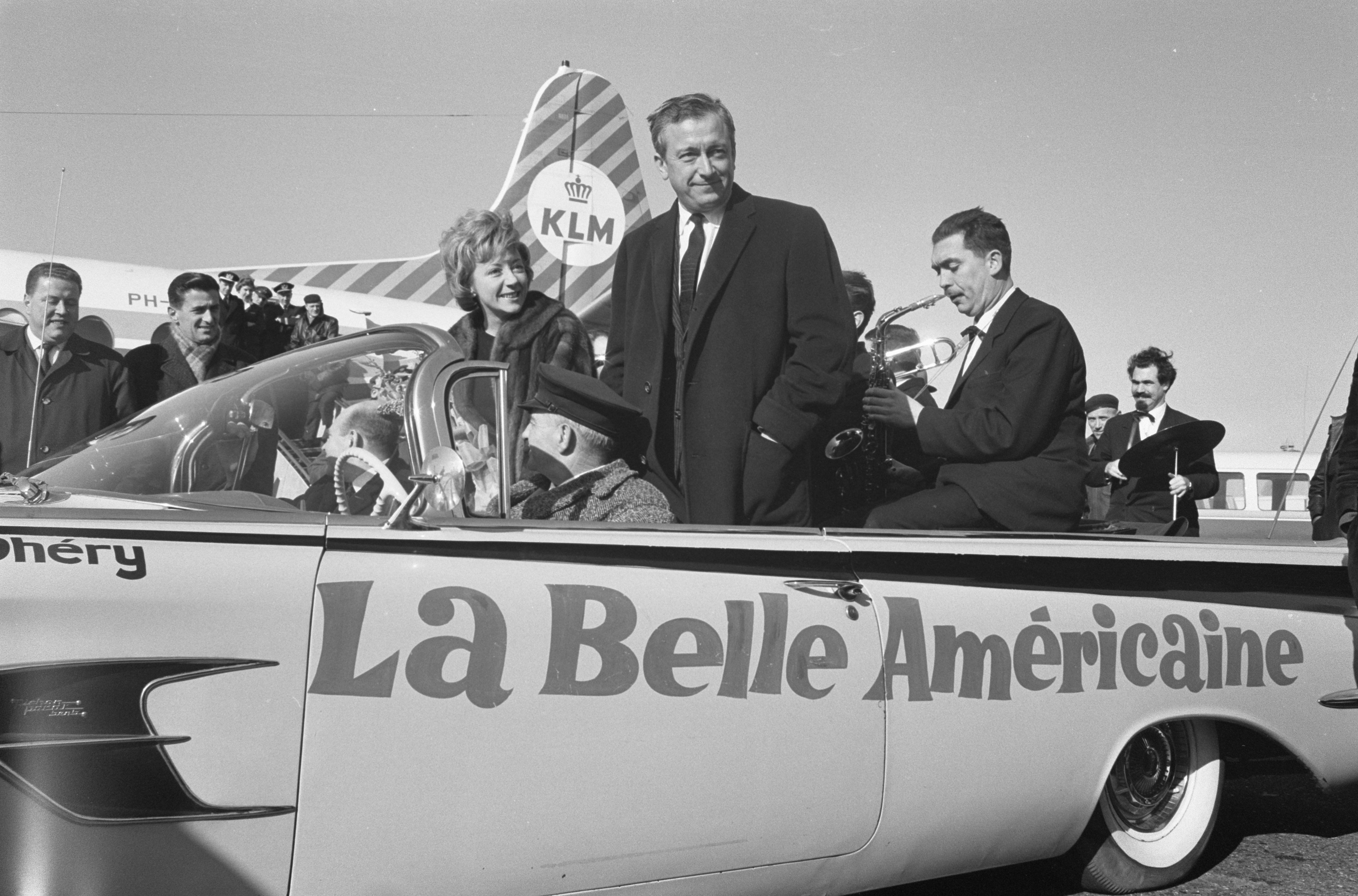 Collectie / Archief : Fotocollectie Anefo Reportage / Serie : [ onbekend ] Beschrijving : Robert Dhery, de Franse regisseur van de film "La Belle Americaine" met echtgenote en actrice Colette Brosset op Schiphol (+ de originele "Belle Americaine" auto , waarop "My Fair Lady" tekst afgebroken] Datum : 22 februari 1962 Locatie : Schiphol, Zuid-Holland Trefwoorden : actrices, auto's, film, filmregisseurs, filmsterren, vliegvelden Persoonsnaam : Brosset, Colette, Dhery Robert Fotograaf : Pot, Harry / Anefo Auteursrechthebbende : Nationaal Archief Materiaalsoort : Negatief (zwart/wit) Nummer archiefinventaris : bekijk toegang 2.24.01.05 Bestanddeelnummer : 913-5524